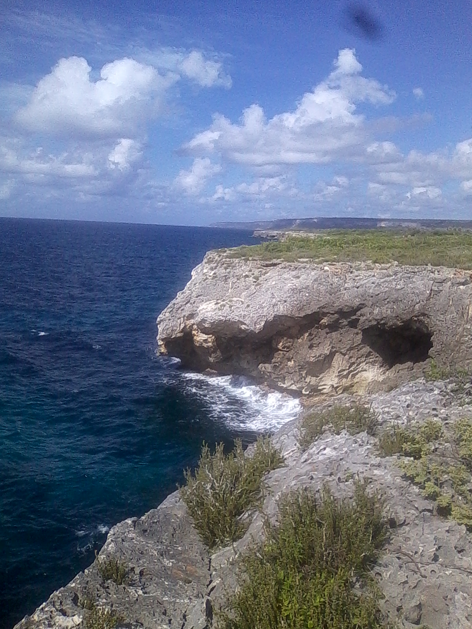 Costa de Niquero